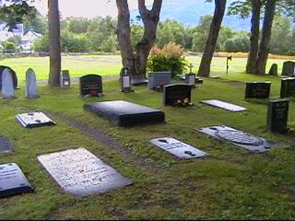 Cemeterie: Grytten, Åndalsnes, in Norway